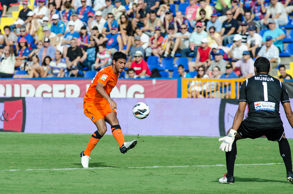 Llevant-Erreala